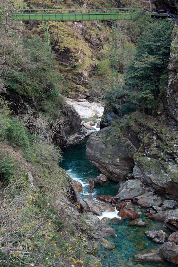 Il punto in cui il rio Valgrande si unisce al rio Pogallo per formare il torrente San Bernardino, tra il comune di Cossogno (VB) e quello di San Bernardino Verbano (VB)